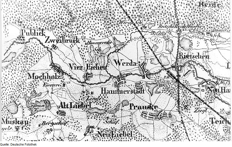 Original image description from the Deutsche Fotothek Rietschen-Viereichen. Topographische Karte vom Preußischen Staate, Bl. 251 Niesky, 1823/46